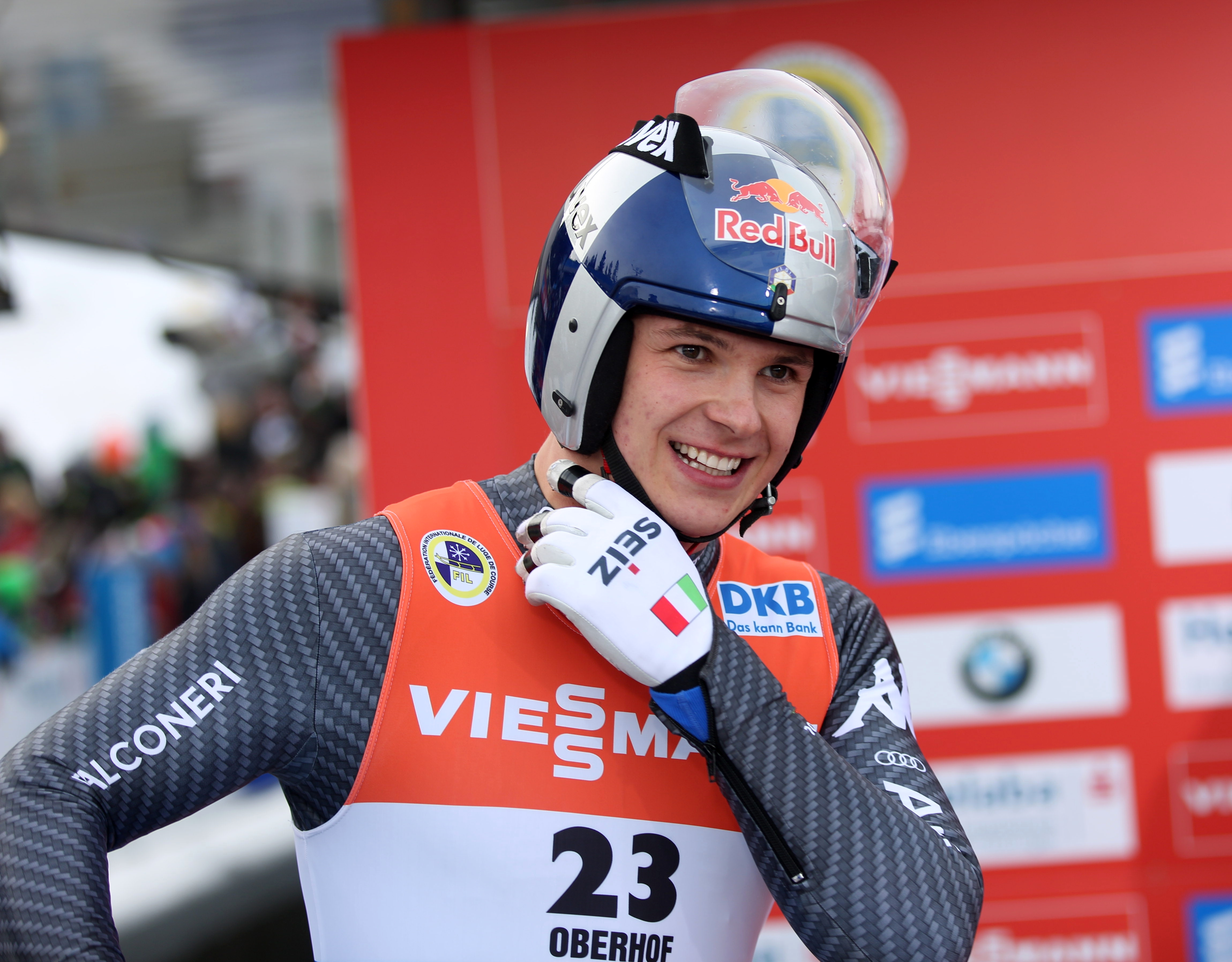 Dominik Fischnaller beim Rennrodel-Weltcup der Männer in Oberhof 2017